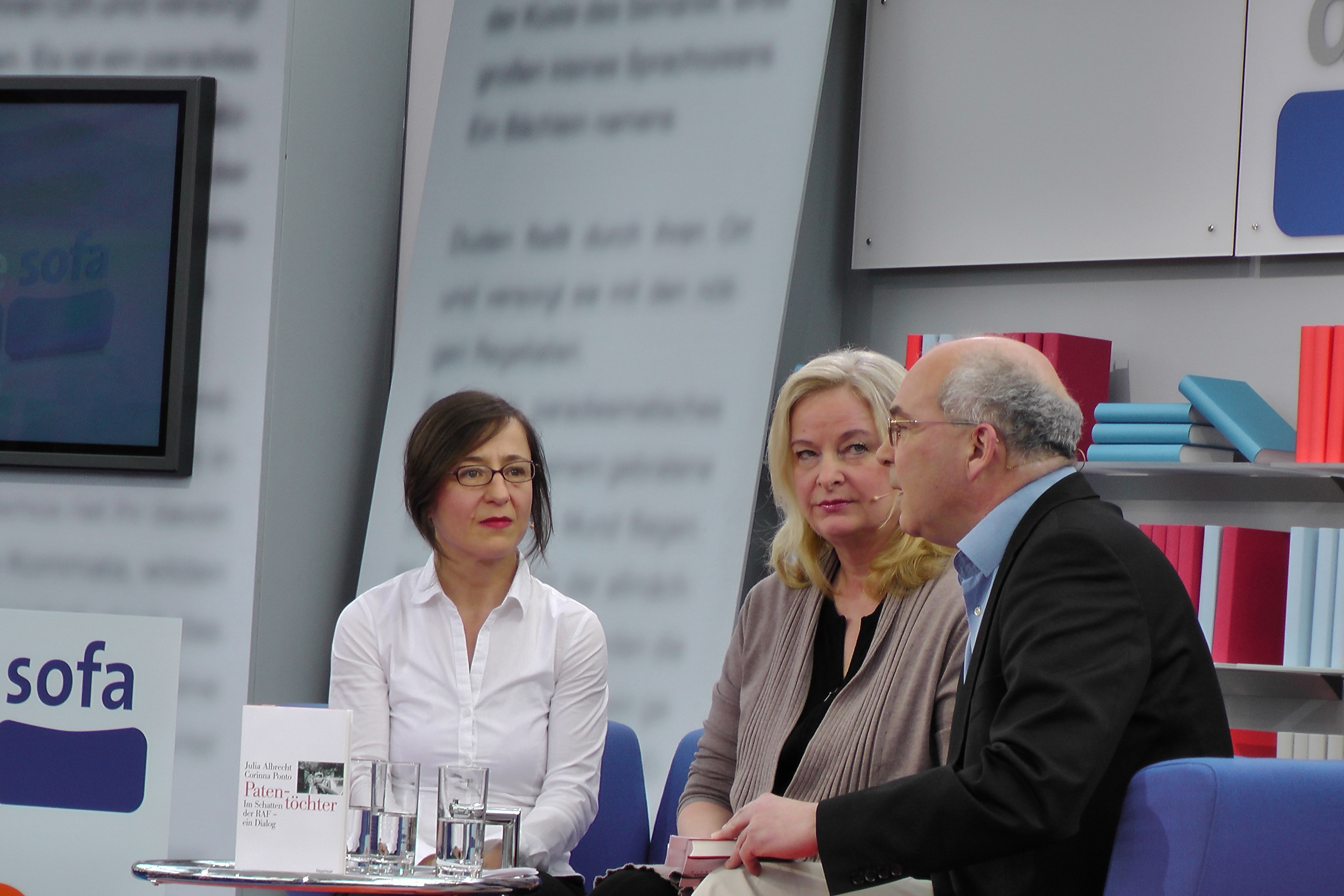 Dieses Fotos dürfen Sie honorarfrei nutzen, wenn Sie folgenden credit beachten: Copyright: Das blaue Sofa / Club Bertelsmann. Julia Albrecht, Jahrgang 1964, arbeitete als Journalistin und Juristin in Berlin, Jerusalem und San Francisco. Mit ihrem Mann und ihren Kindern lebt sie heute in Berlin. Corinna Ponto war nach Theater- und Musikstudium in New York, Köln und Frankfurt Opernsängerin. Heute lebt sie mit ihrer Familie in Süddeutschland und wirkt im Kuratorium der Jürgen Ponto-Stiftung zur Förderung junger Künstler mit.